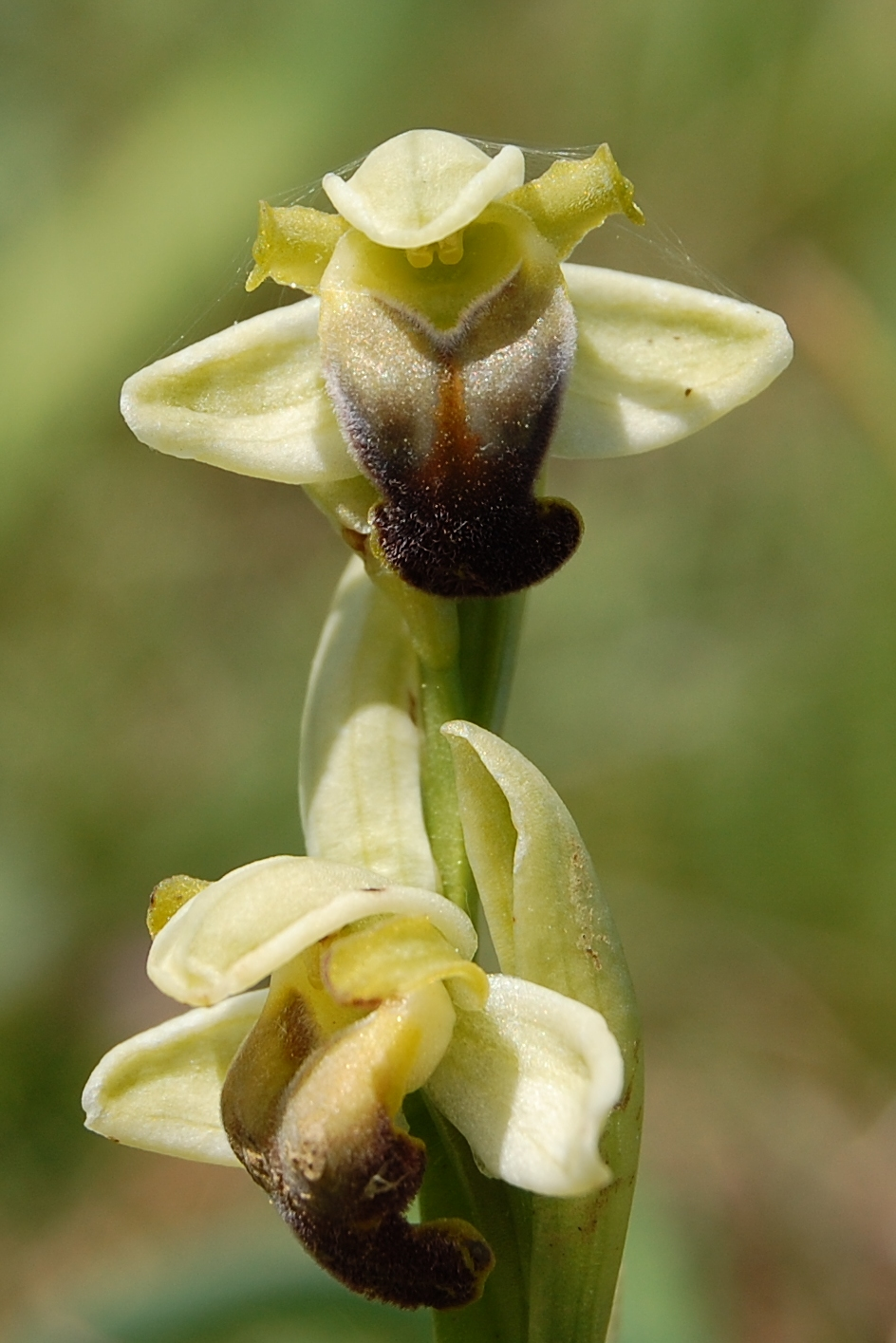 Ophrys pallida Raf. Bosco della Ficuzza, Sicily